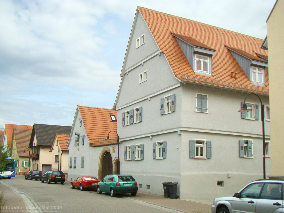 Amtmannshaus in Heilbronn-Kirchhausen